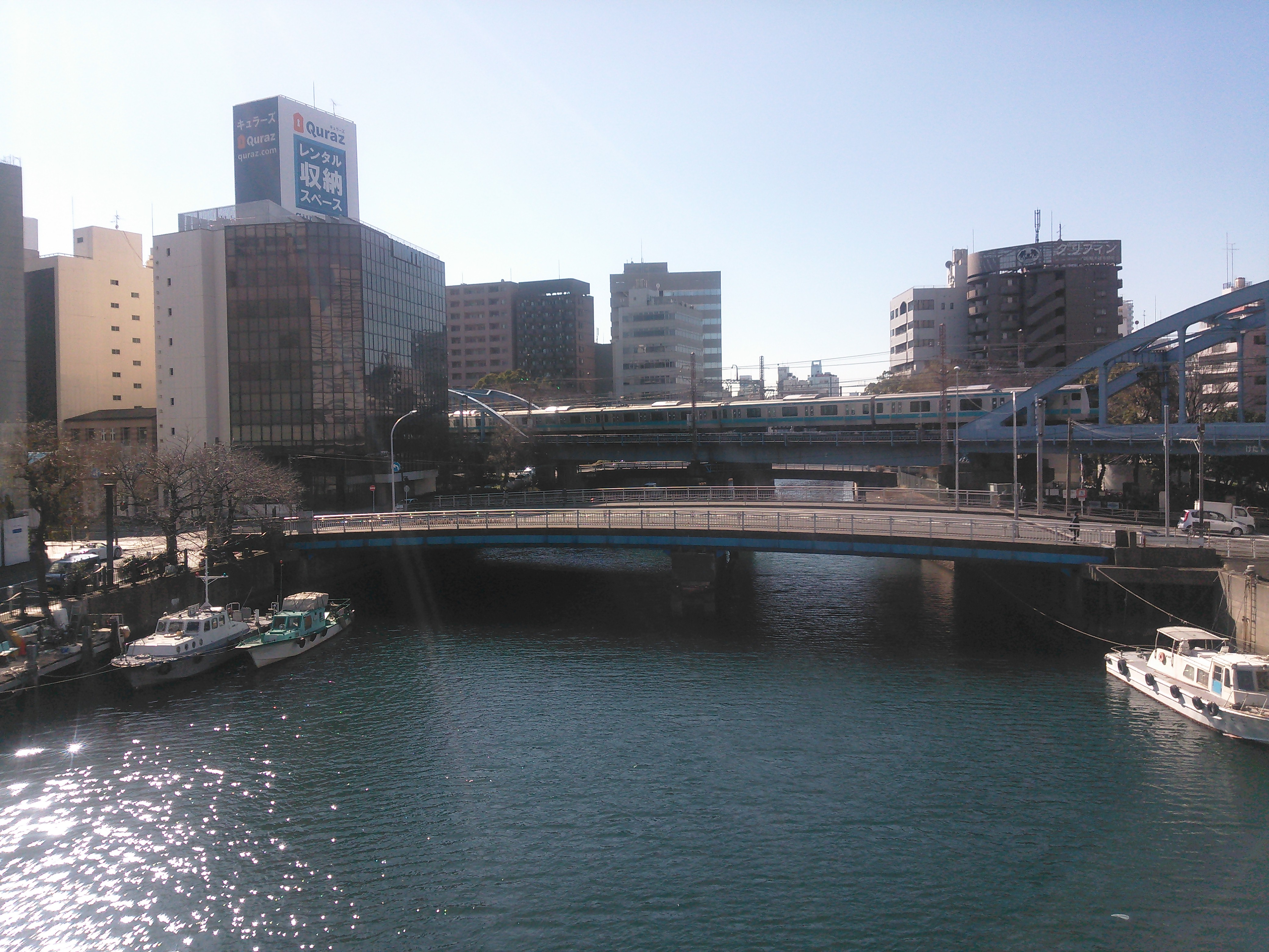 横浜市中区、大江橋